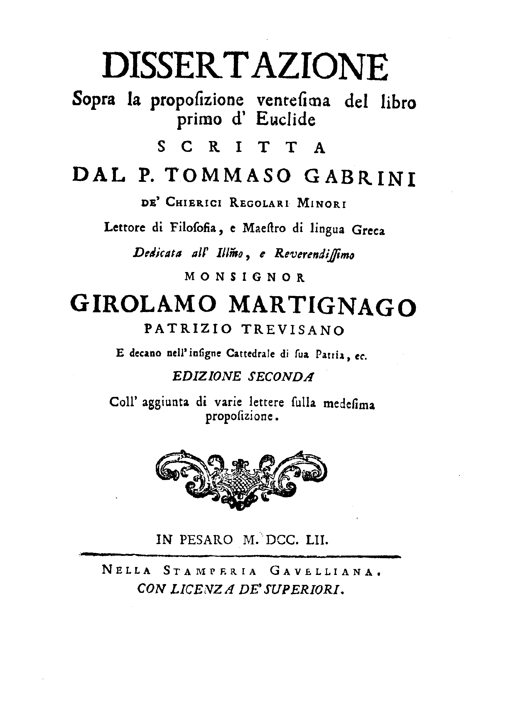 Dissertazione sopra la proposizione ventesima del libro primo d'Euclide scritta dal p. Tommaso Gabrini … dedicata all' ill. mo ... monsignor Girolamo Martignago …. - In Pesaro : nella stamperia Gavelliana, 1752. - 22, [6] p. ; 4º. - Esemplare mutilo delle ultime 6 pagine. .